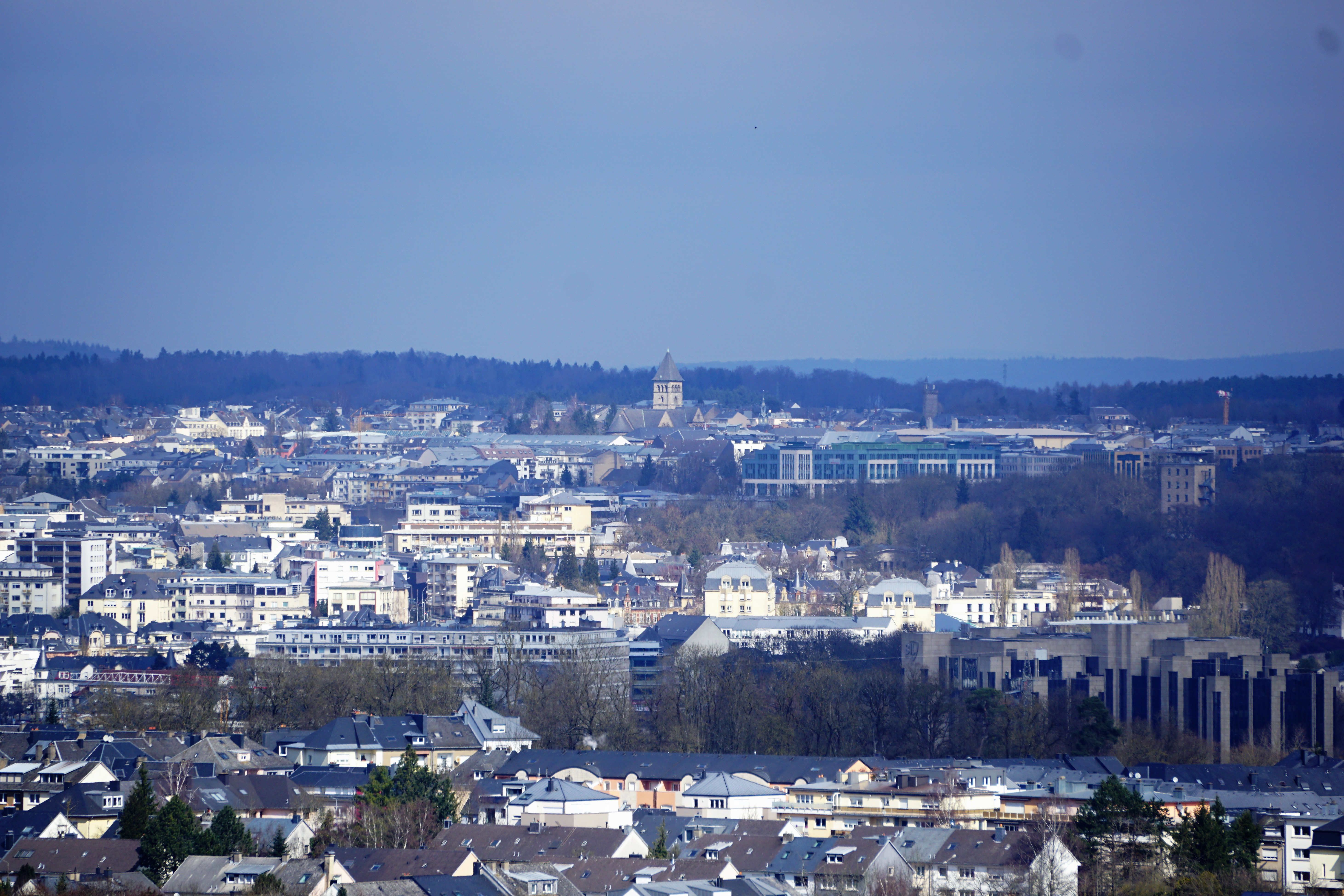 Luxembourg, vue sur les quartiers de Hollerich et Limpertsberg, prise depuis le château d'eau de la Cloche d'Or.